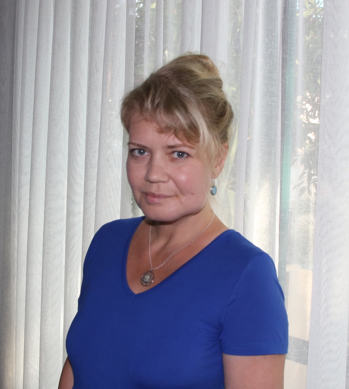 Karin Kaup Lapõnin